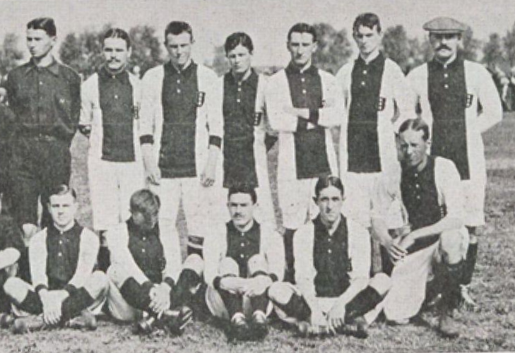 Elftal van Ajax (3 september 1911)V.l.n.r. staand: speler HFC Haarlem, Frans Schoevaart, Louis Seylhouwer, Toon Kooi, Chris Kammeijer, Joop Pelser, Henk Schutte. Zittend v.l.n.r.: Gerard Fortgens, Piet van den Broecke, Jan Schoevaart, Karel van der Lee, Jan Grootmeijer.